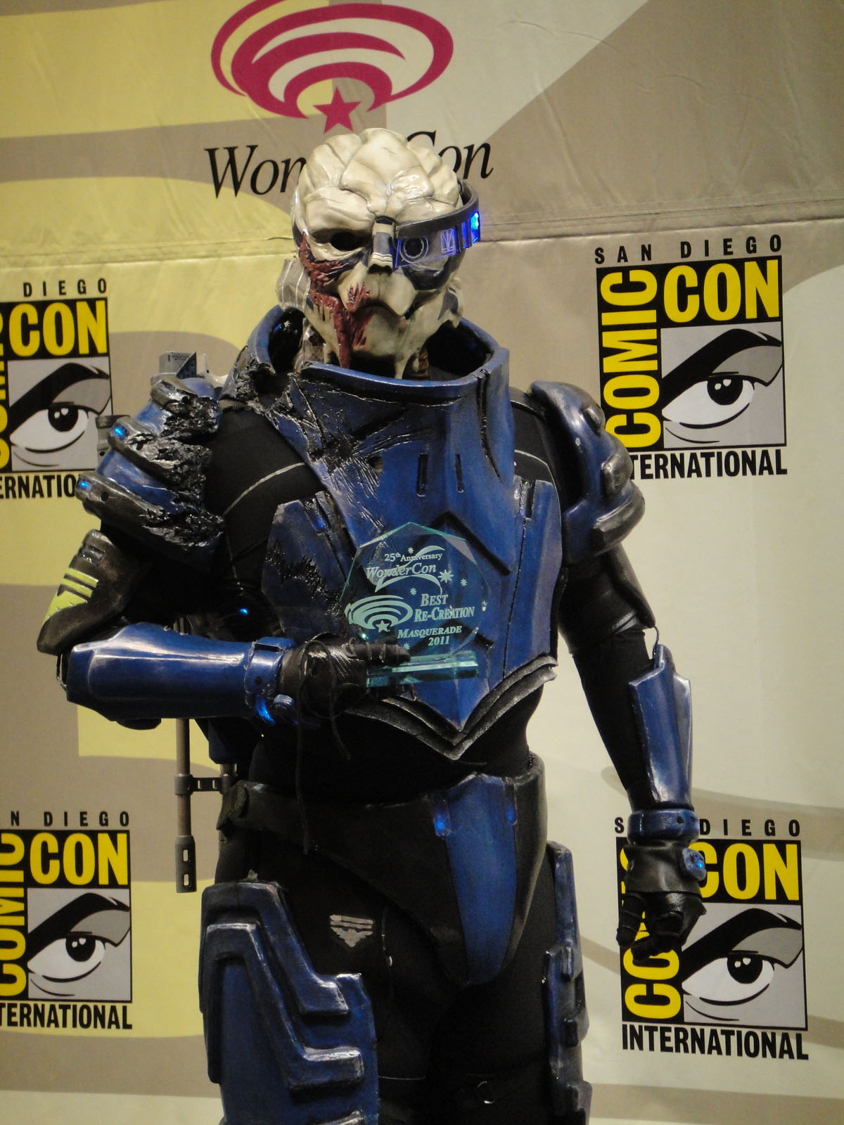 WonderCon 2011 Masquerade Winners - Garrus Vakarian